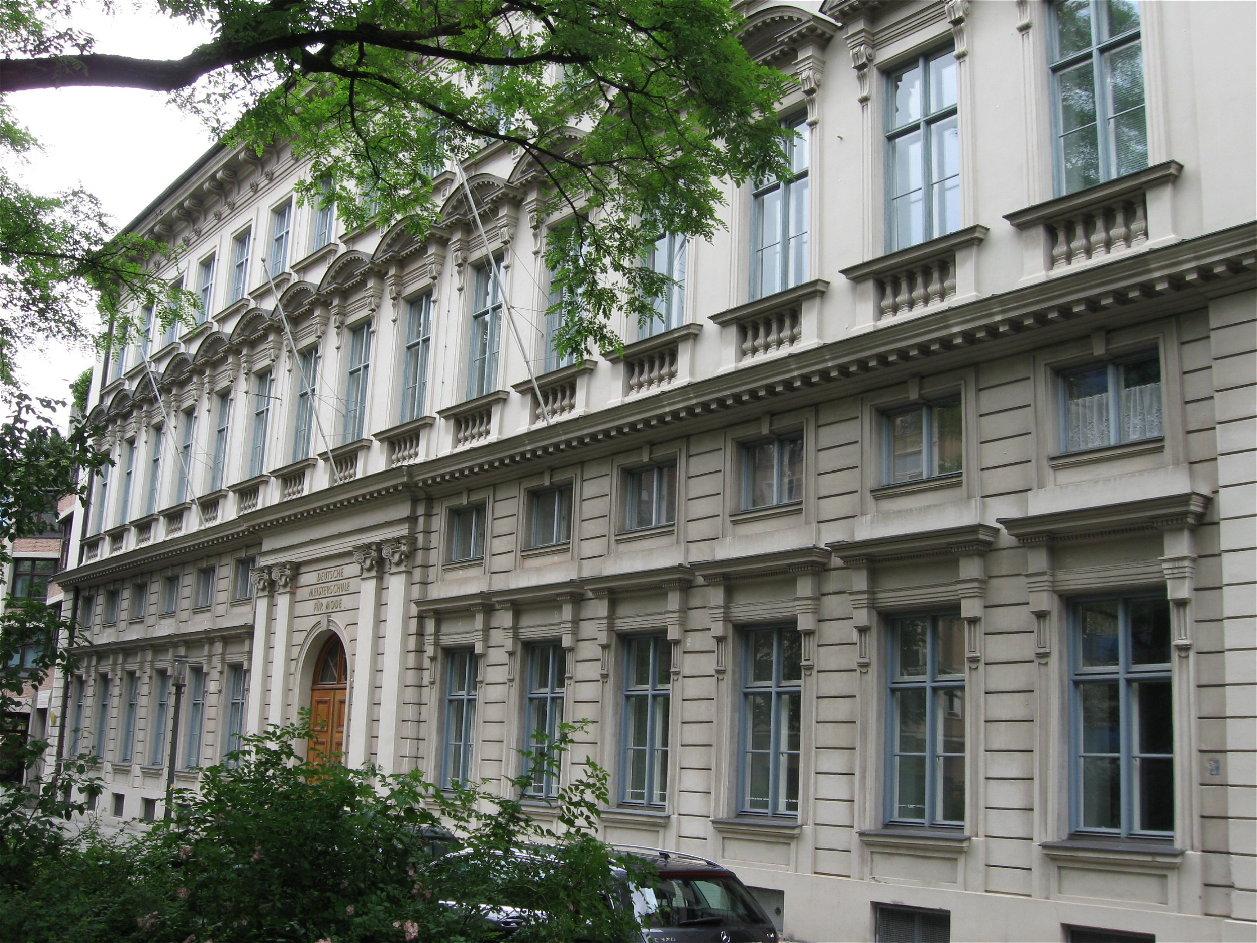 Neues Landschaftsgebäude, Meisterschule für Mode, Roßmarkt 15, München